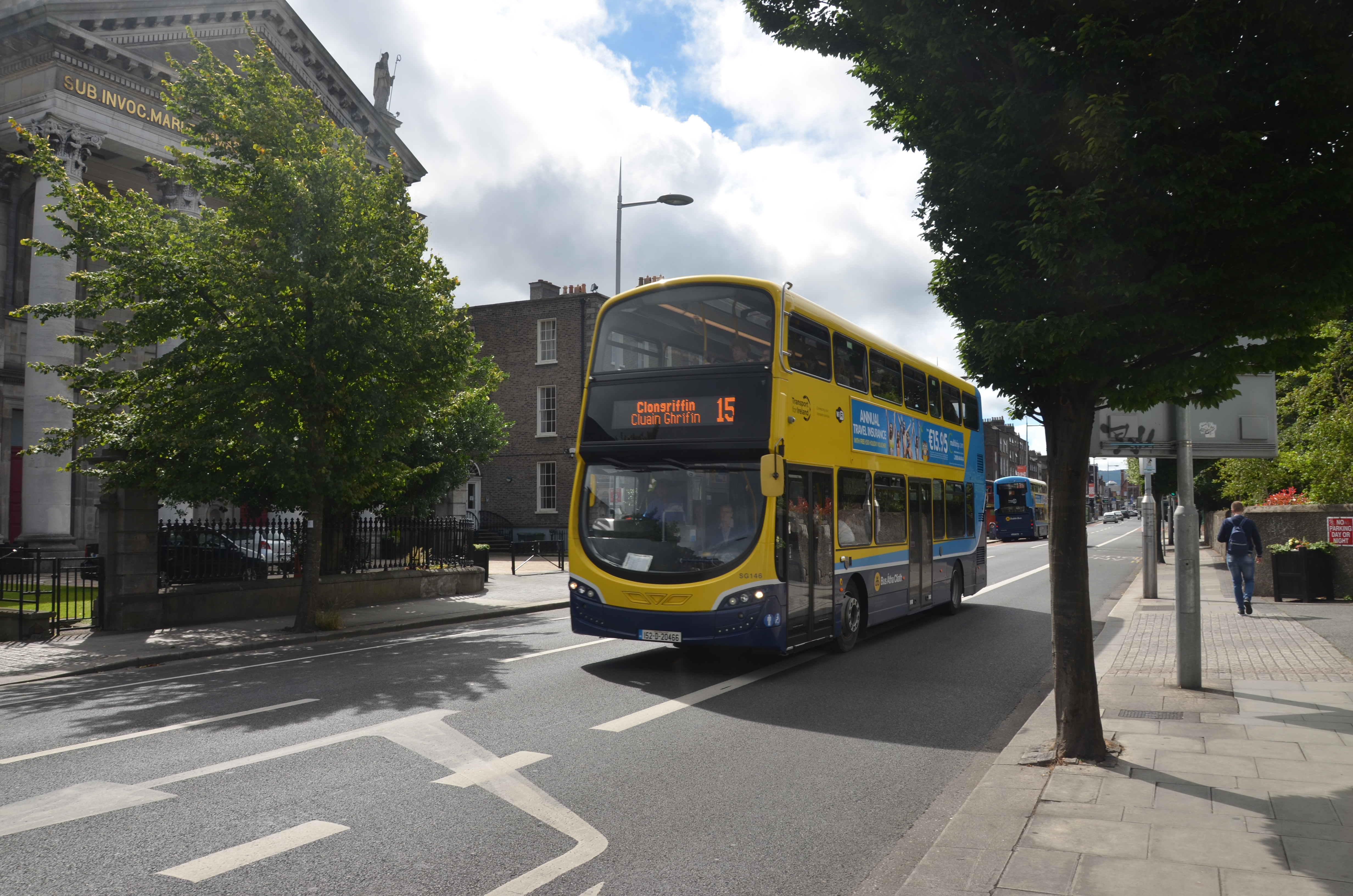 Een bus in Dublin.